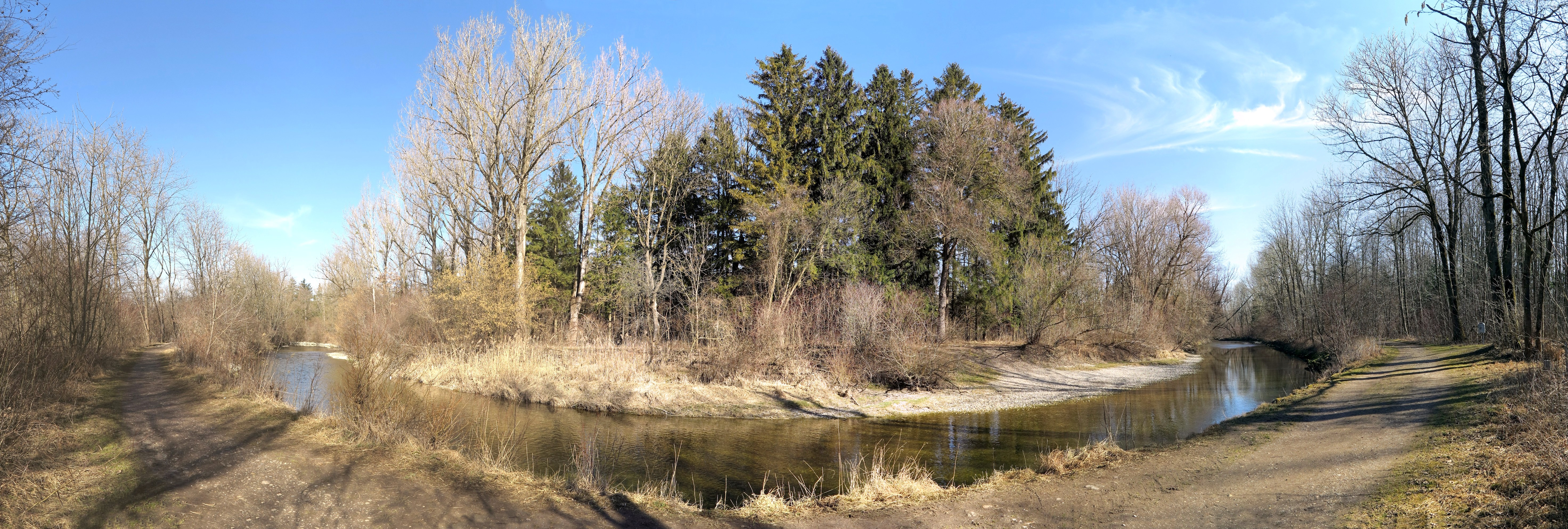 Deutschland, Bayern, Landkreis Fürstenfeldbruck, Gemeinde Olching, Amperschleife